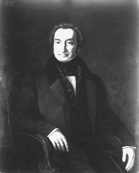 Jean Pierre Frédéric Ancillon (* 30. April 1767 in Berlin; † 19. April 1837), preußischer Staatsmann